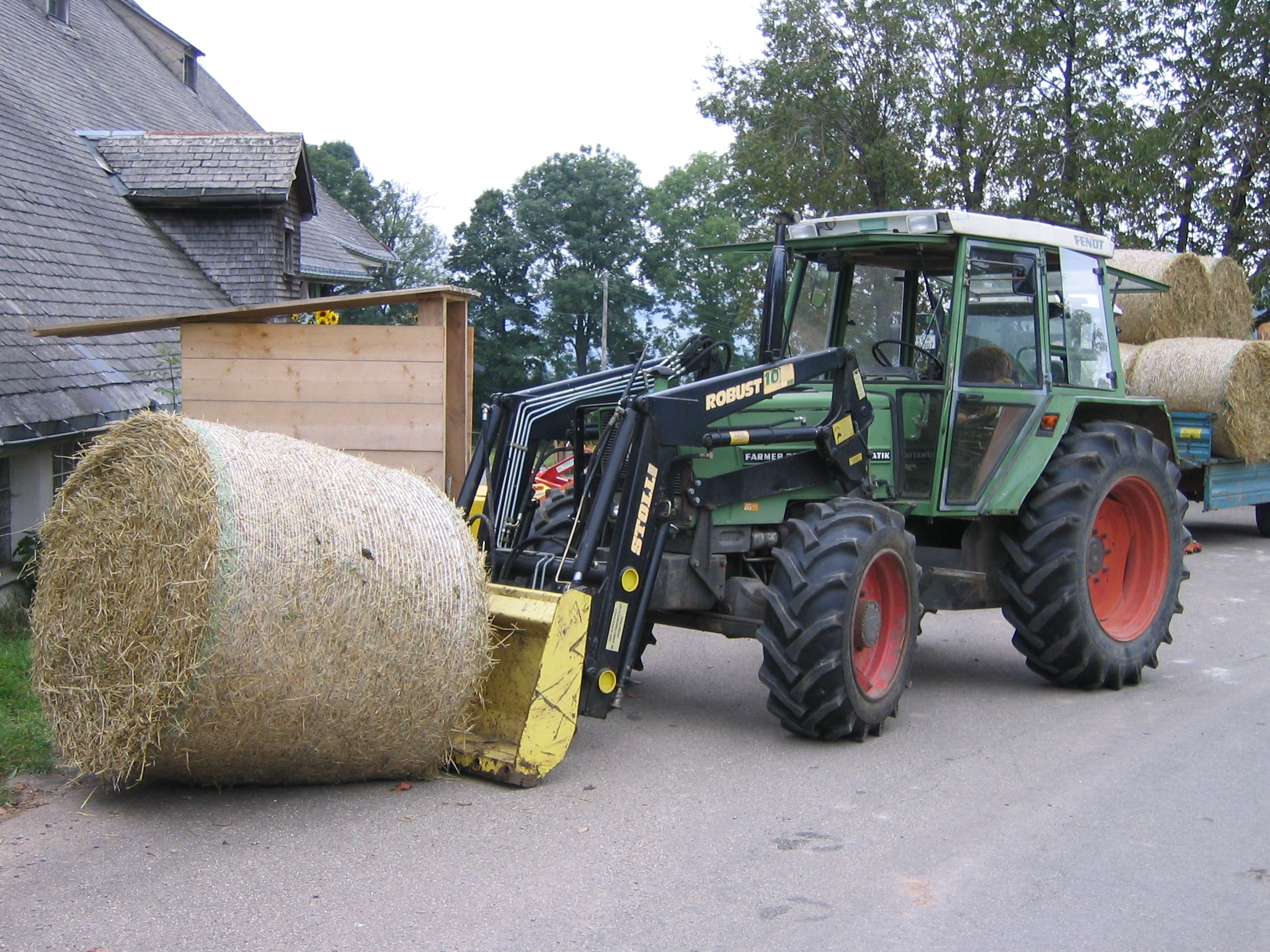 Fendt Farmer Turbomatik mit Stoll-Frontlader und Strohballen